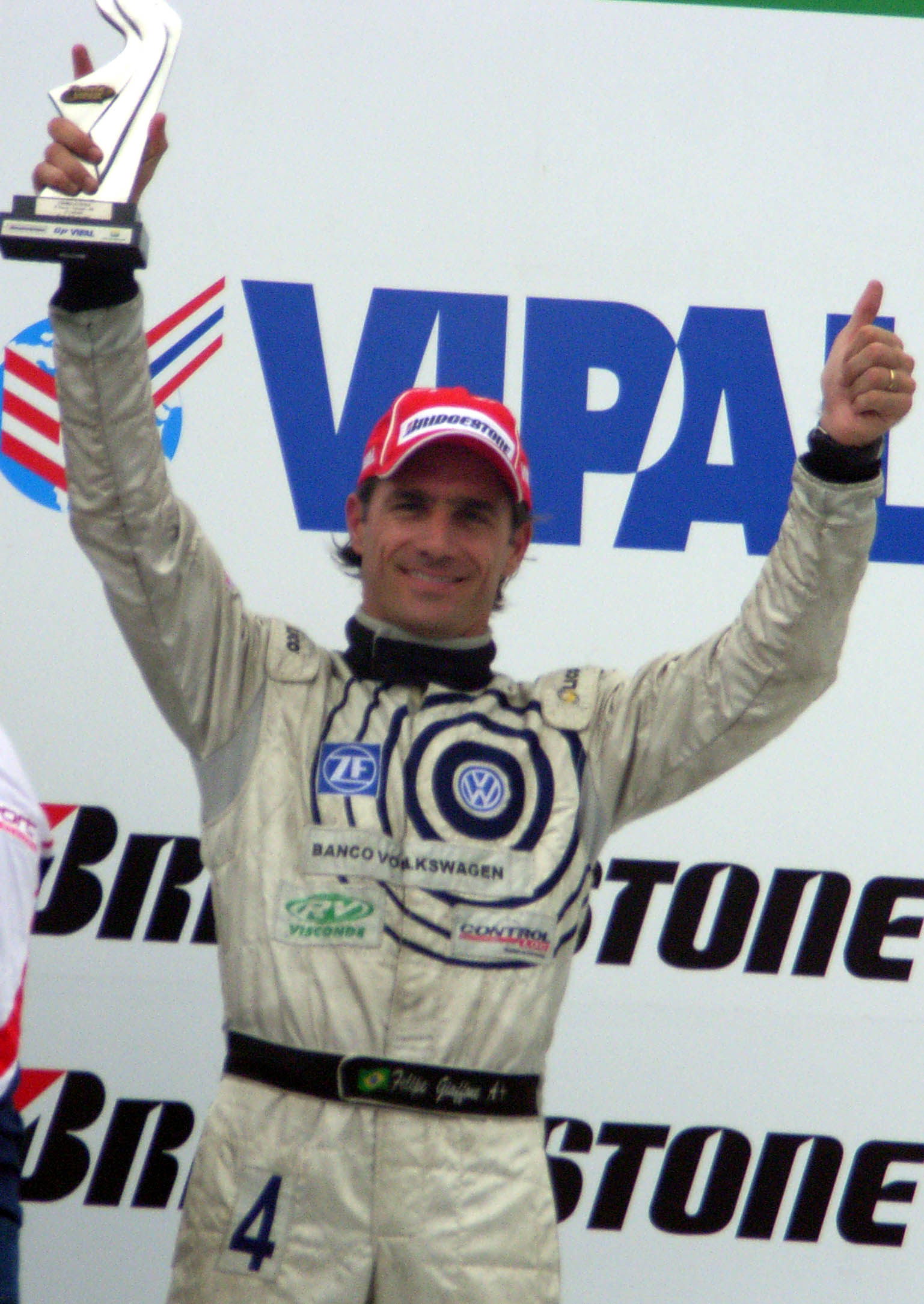 Fórmula Truck 2007 Rd.2 Tarumã: Felipe Giaffone (RM Competições)